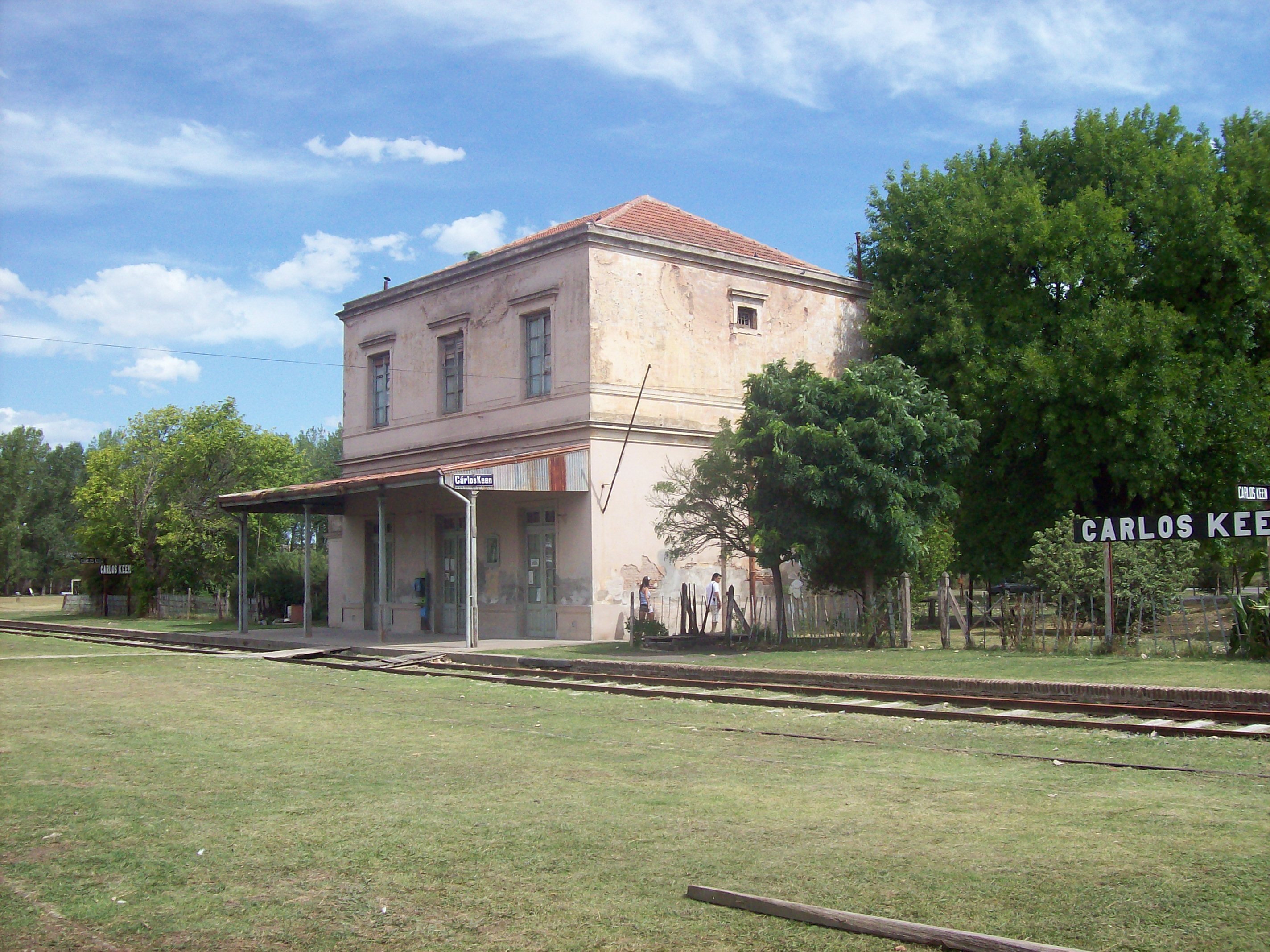 Estación de tren Carlos Keen, en la ciudad homónima, Partido de Luján, Provincia de Buenos Aires, Argentina